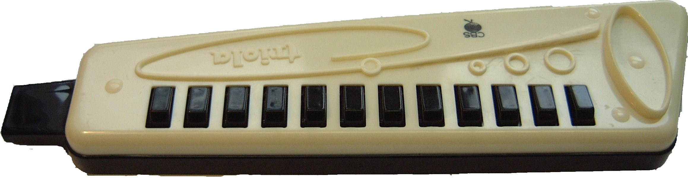 Ein Spritzguss-Prototyp der alten Triola. Aufgrund des Aufwands wurde für den Prototyp alle Tasten mit dem selben Kunststoff gespritzt. Die verkaufsfertige Triola hingegen hatte bunte Tasten.